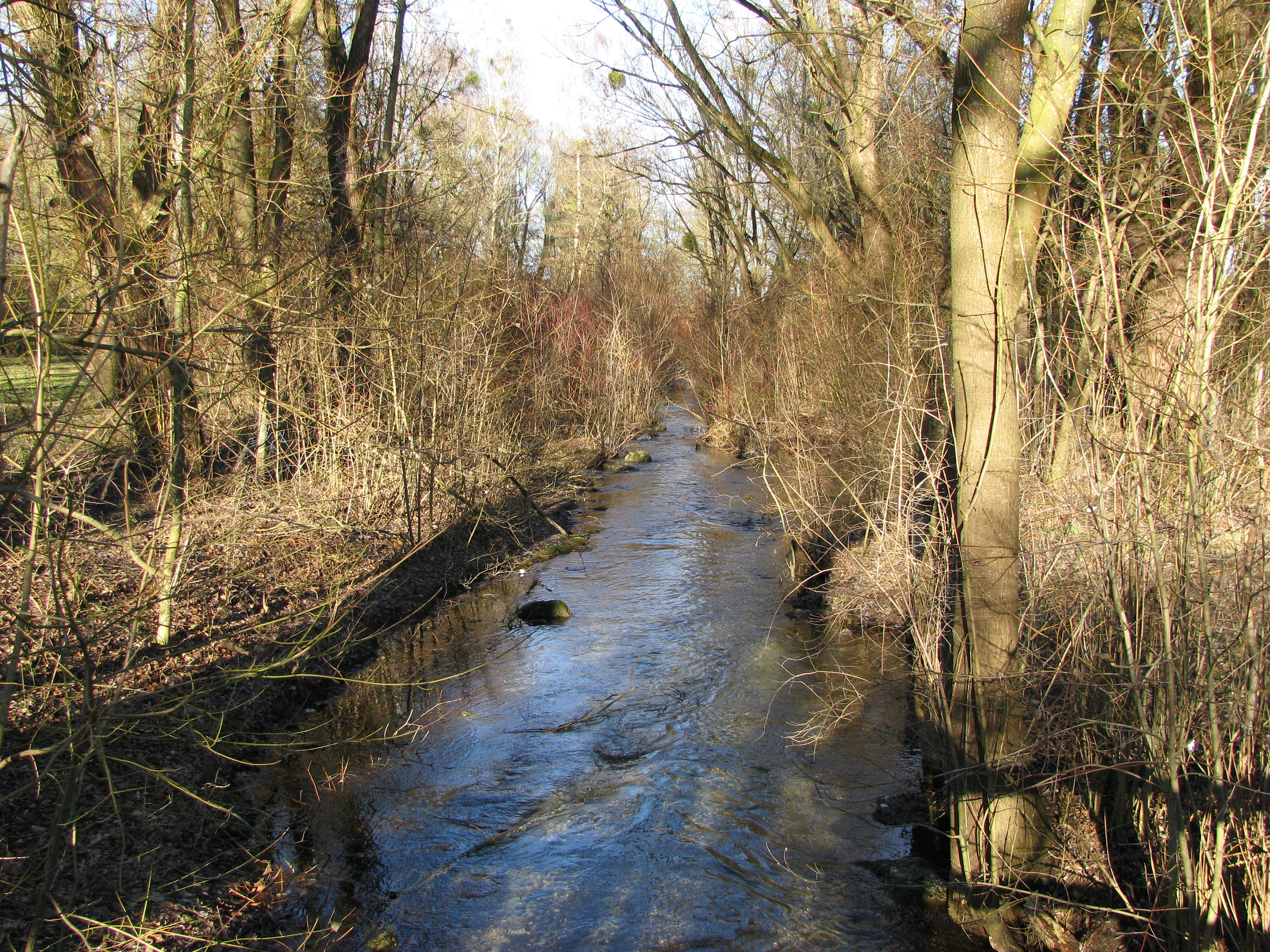 Kalterbach wenige Meter nach seinem Beginn am Feldmochinger See.